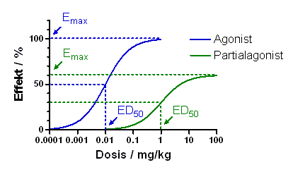 Dosis-Wirkungs-Kurve mit Angabe des Maximaleffekts (Emax) und der Dosis zur Erzielung eines halbmaximalen Effekts (ED50) für einen Agonisten und einen Partialagonisten. Erstellt von Sven Jähnichen mit Hilfe von GraphPad Prism.